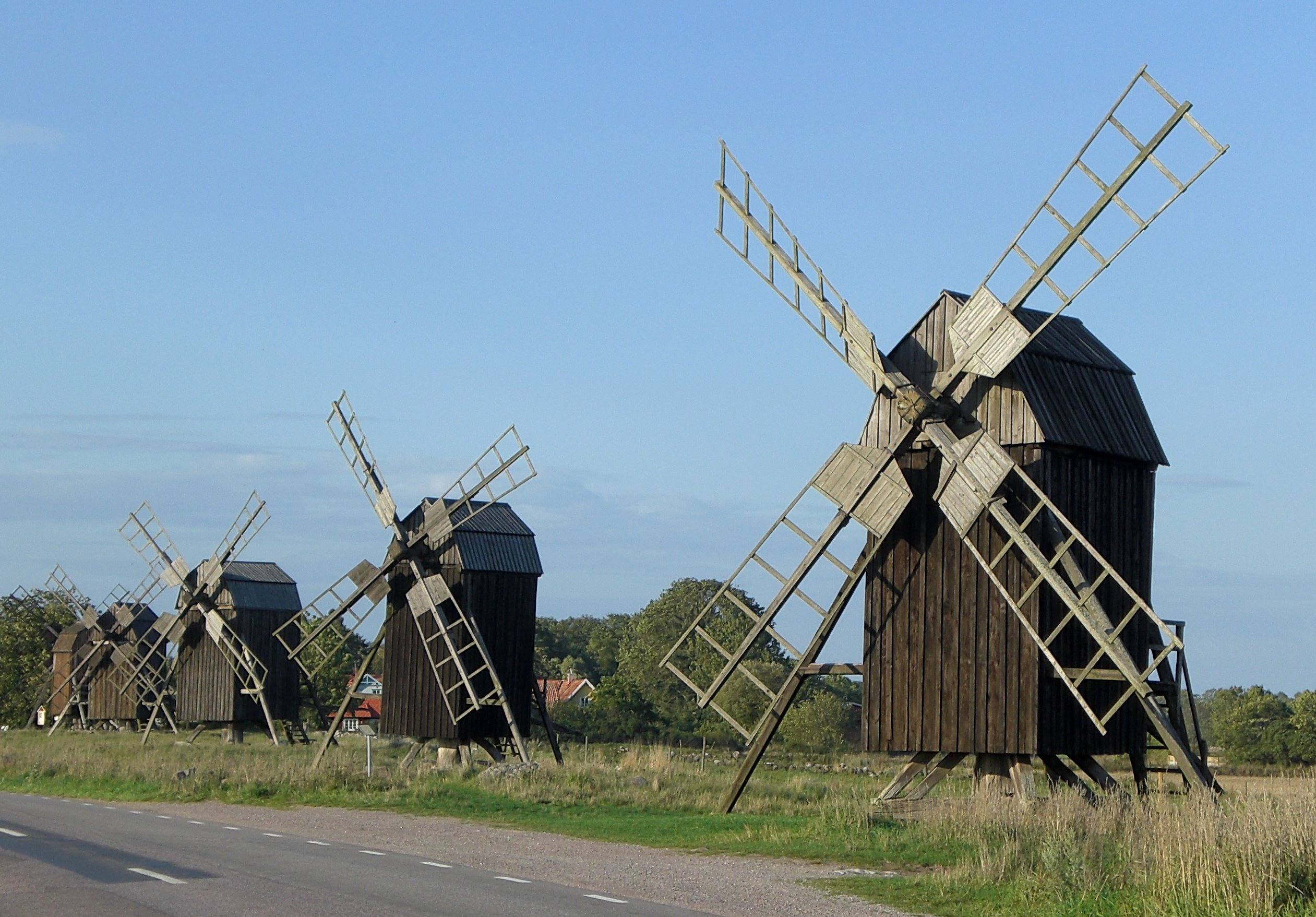 Mühlen von Lerkaka, Sicht von Süden, Öland, Schweden